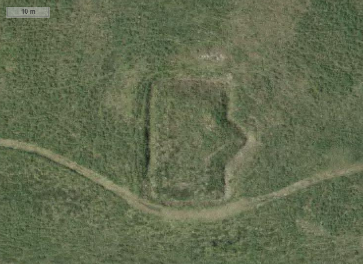 Gartzabalgo fortinaren hondakinen airetiko ikuspegia. Fortina Konbentzioaren Gerran erabili zen (1793-95)